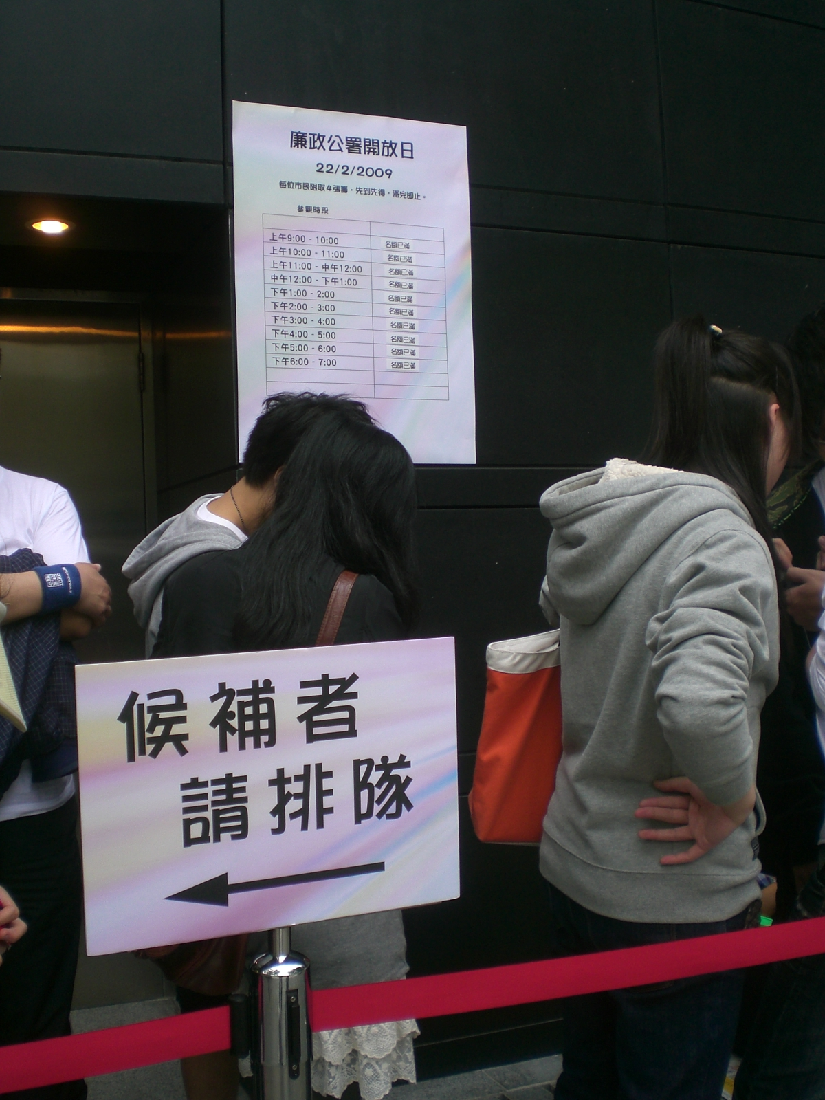 中文（香港）: 北角zh:廉政公署 (香港)2009年開放日。